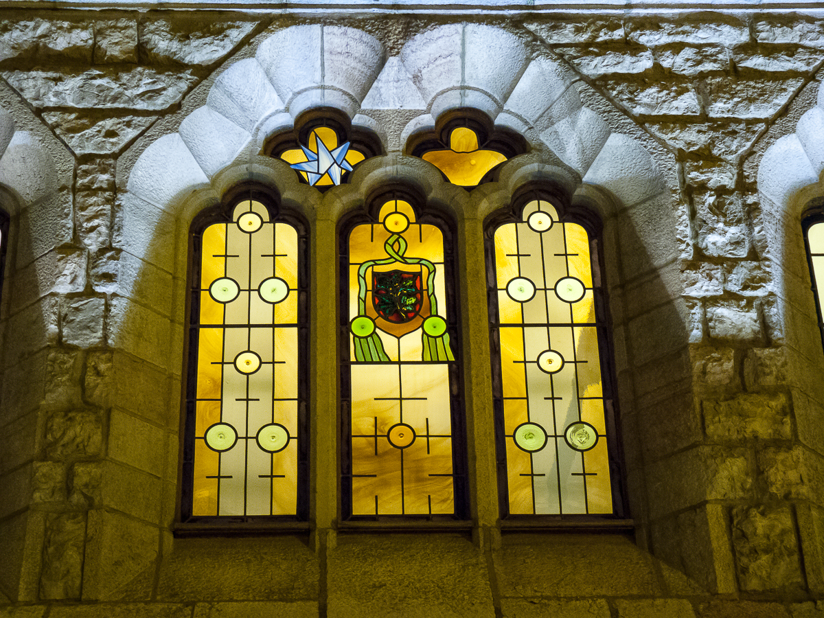 08082013 225941 LEÓN 0492